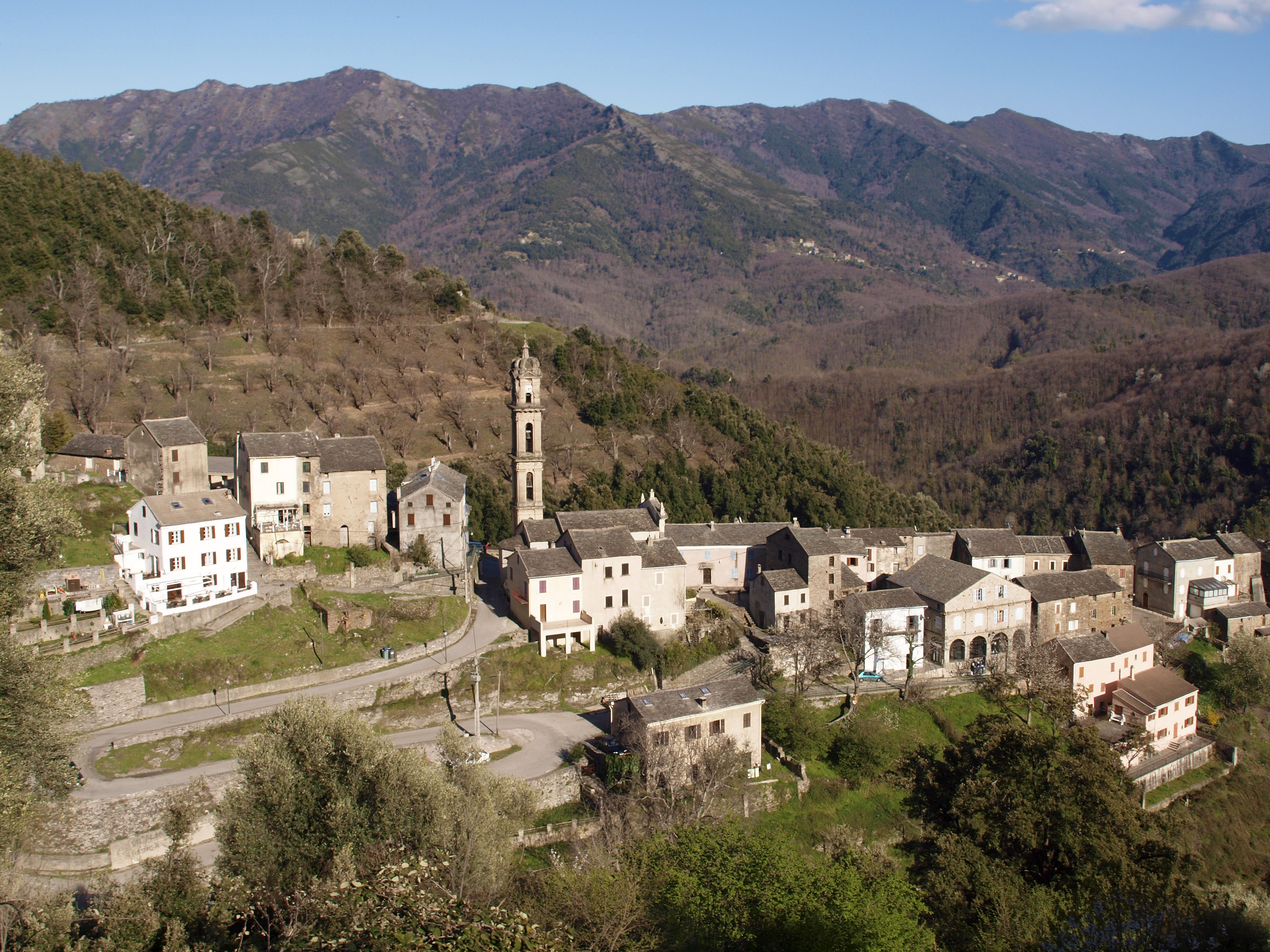 Verdèse (Corsica) - Vue du village